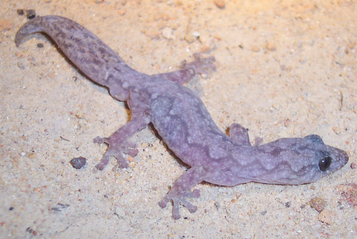 Imported from en:. Original description : A Lesueur's Velvet Gecko, (Amalosia lesueuri) from Sydney.